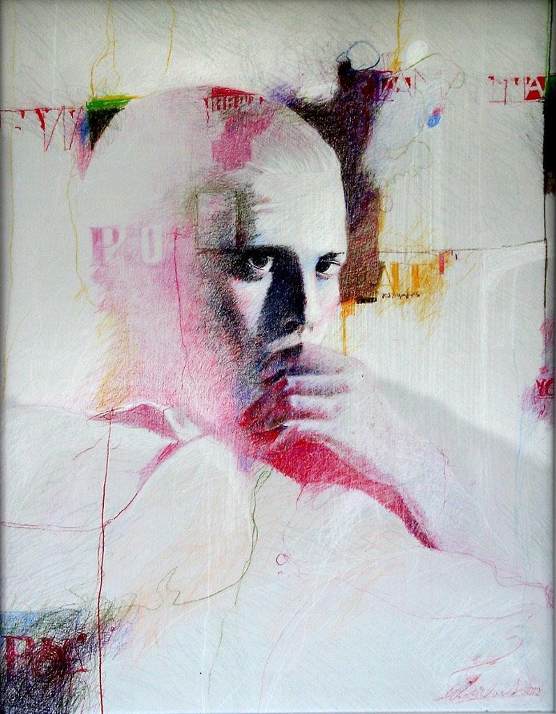 Willy Reichert, Stilrichtung Buntstiftzeichungen